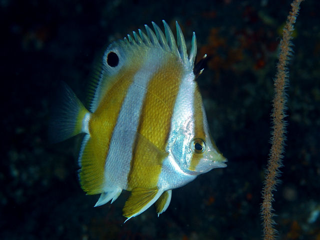 ゲンロクダイ Roa modesta